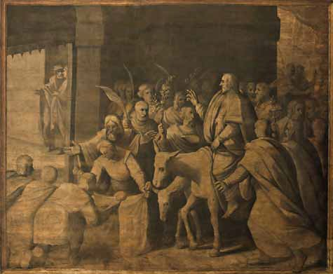 Entrada de Jesús en Jerusalén, óleo sobre lienzo, 460 x 580 cm, Zaragoza, Iglesia de San Pablo, puerta del retablo mayor.